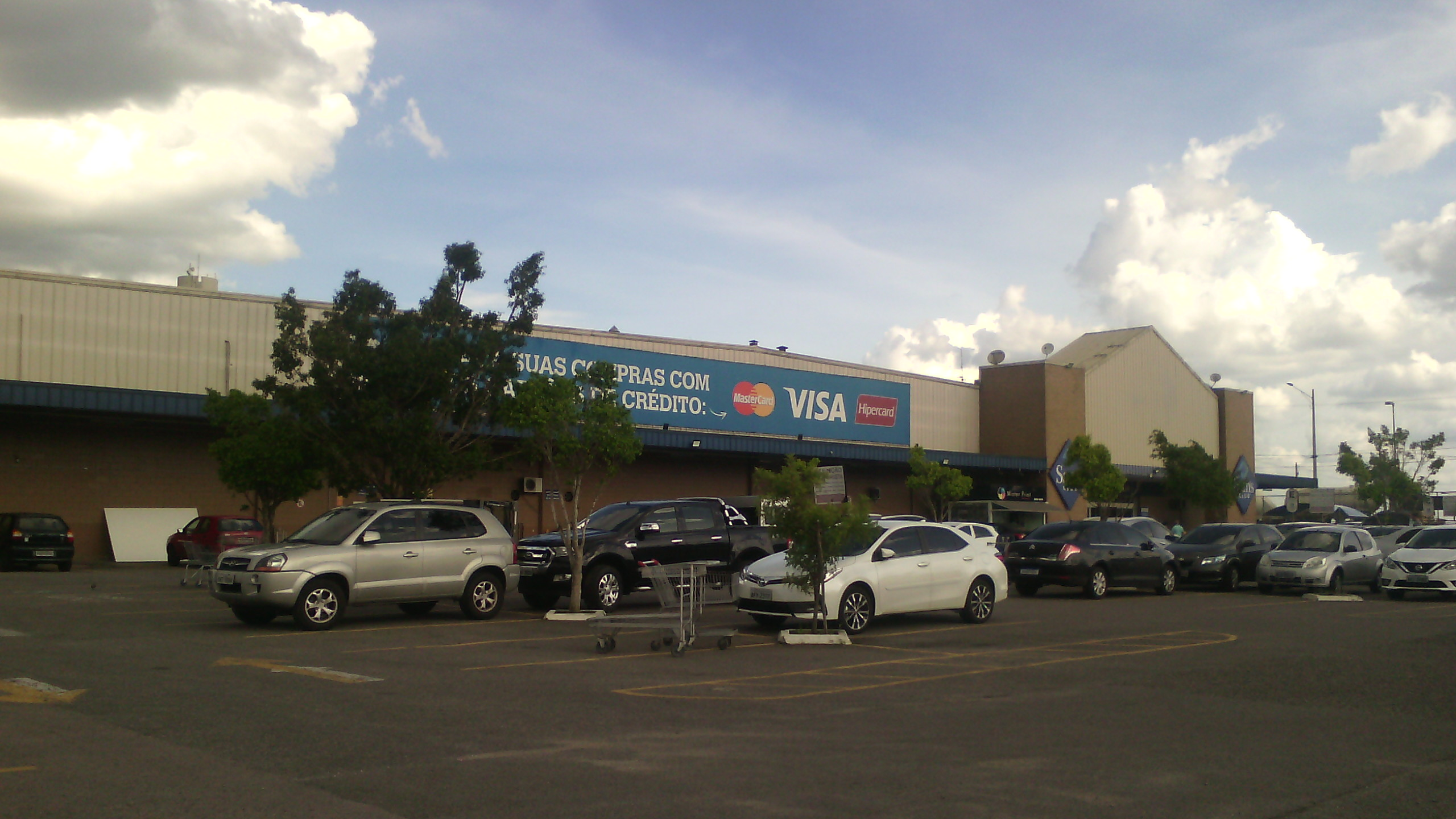 Foto frontal do Sam's Club Atuba, em Curitiba/PR, tirada na data de 18/01/2019.